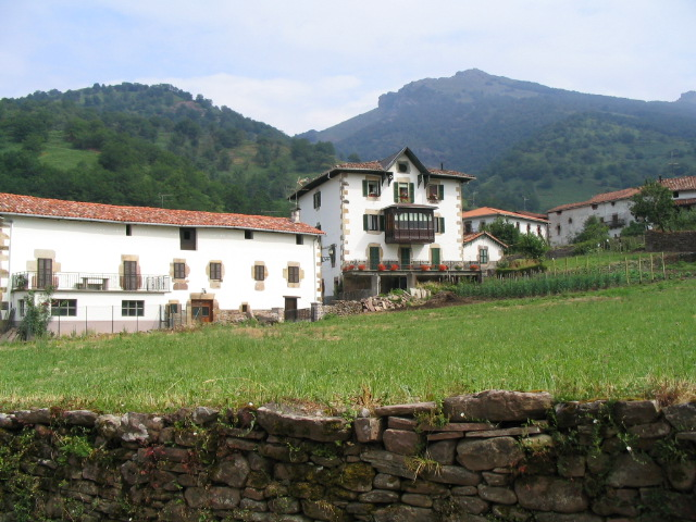 Vue du bourg d'Aurtiz (quartier d'Ituren (Navarre (Pyrénées).